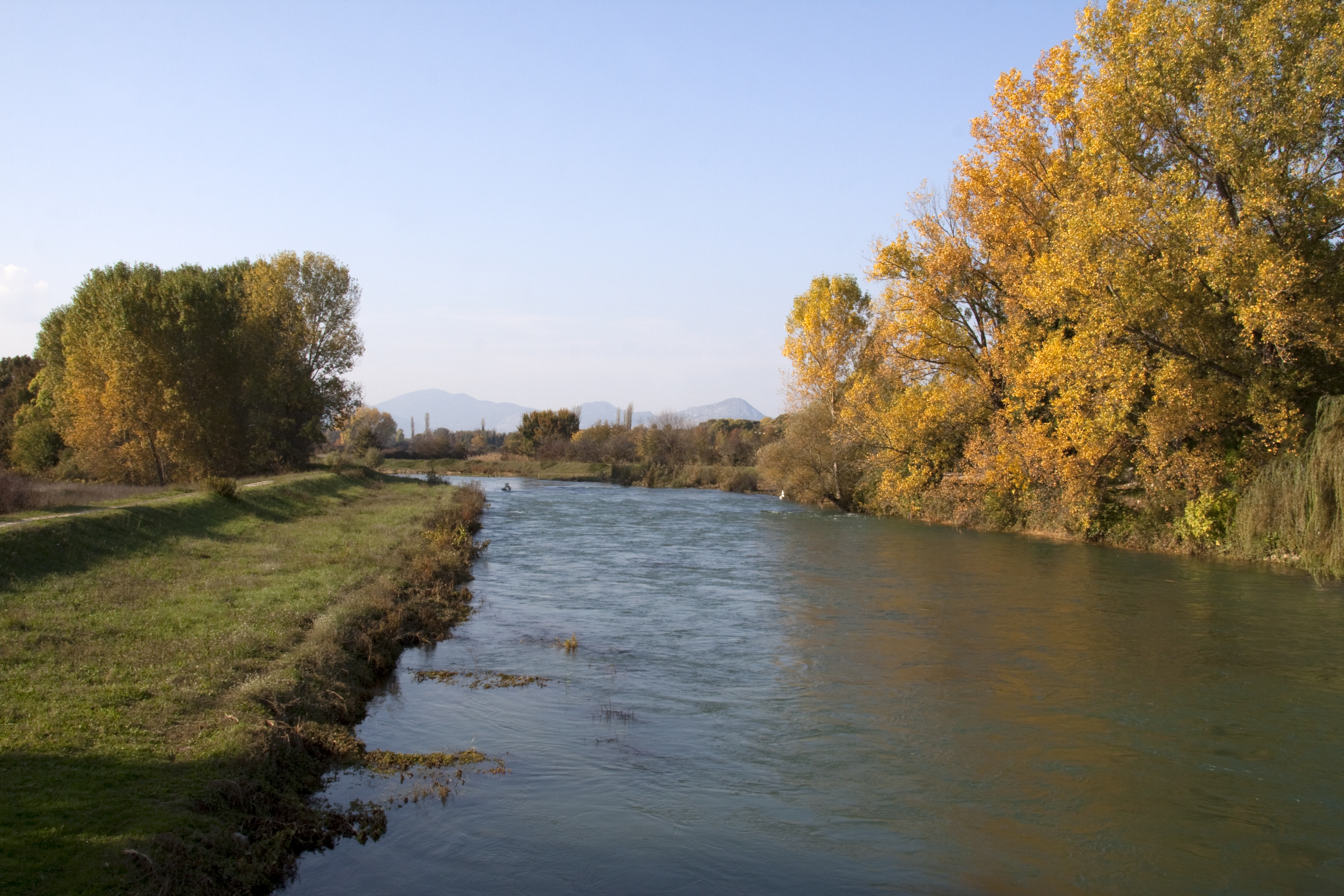 Autumn River Ljubuski